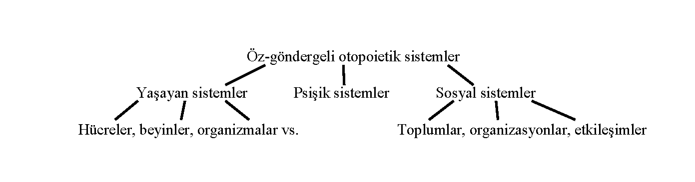 Niklas Luhmann'ın otopoietik sistemler şeması